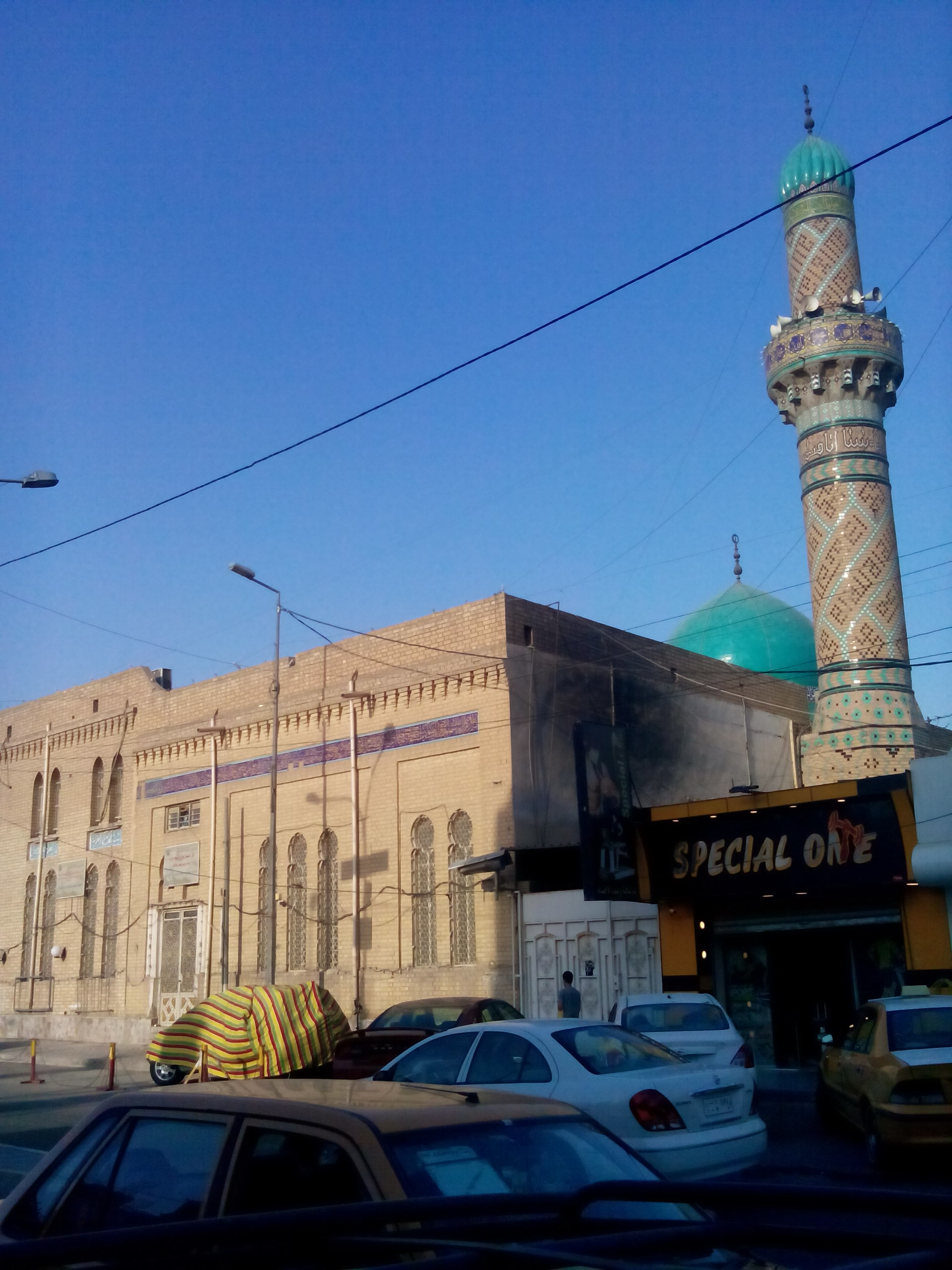 جامع العسافي وهو من مساجد بغداد القديمة التي بنيت في عهد الملك فيصل الثاني، ولقد سمي نسبة لأسرة باني المسجد عبد العزيز العسافي، ويقع جامع العسافي في قضاء الأعظمية في جانب الرصافة من مدينة بغداد، في منتصف شارع الضباط في منطقة راغبة خاتون، وتم تشييد الجامع في عام 1375 هـ/1956م